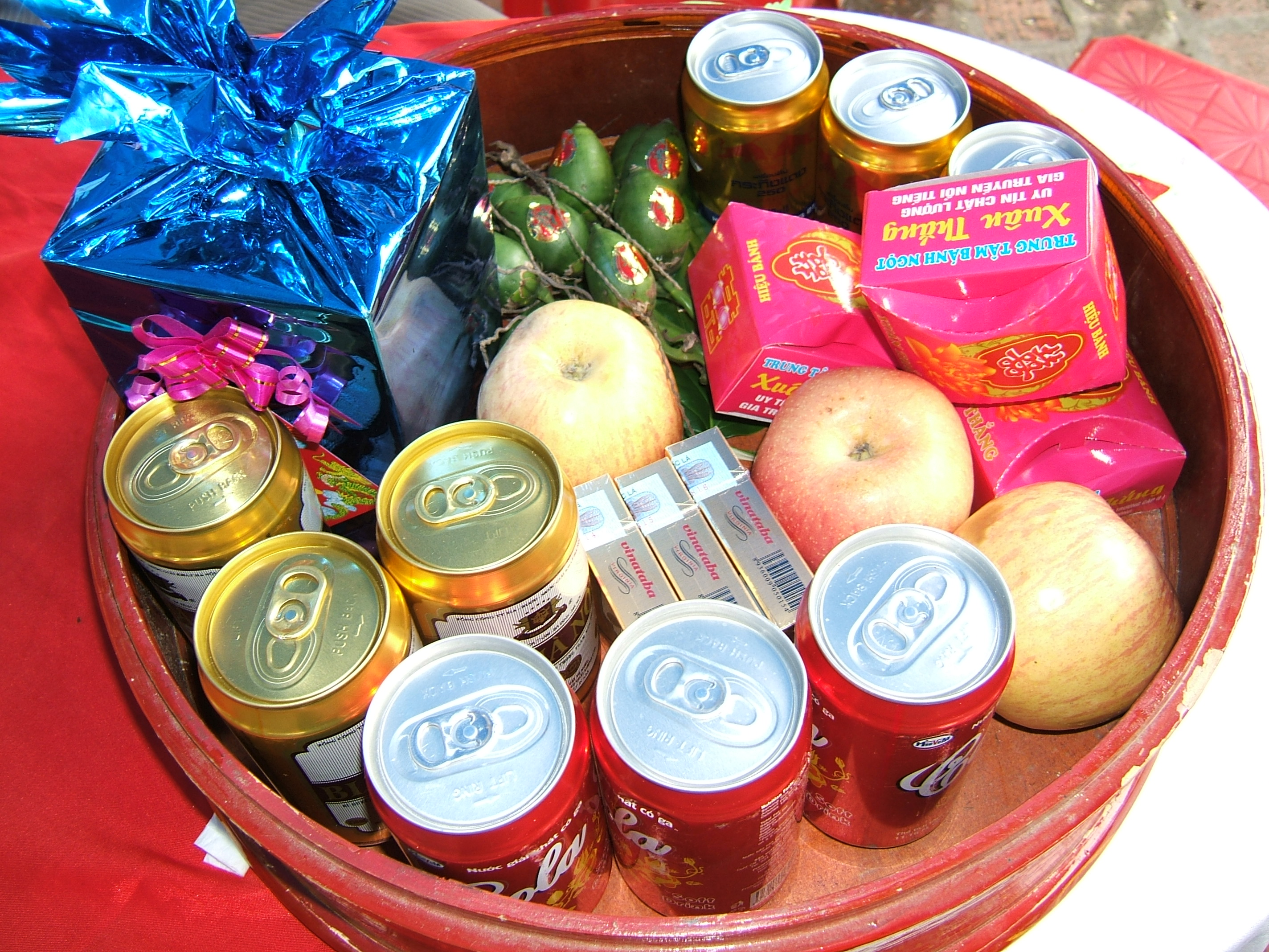 Một số lễ vật nhà gái lại quả cho nhà trai sau khi chia lễ. Ảnh chụp tại Sơn Tây, Hà Tây, lễ vật ăn hỏi do nhà trai mang từ Hải Phòng xuống!